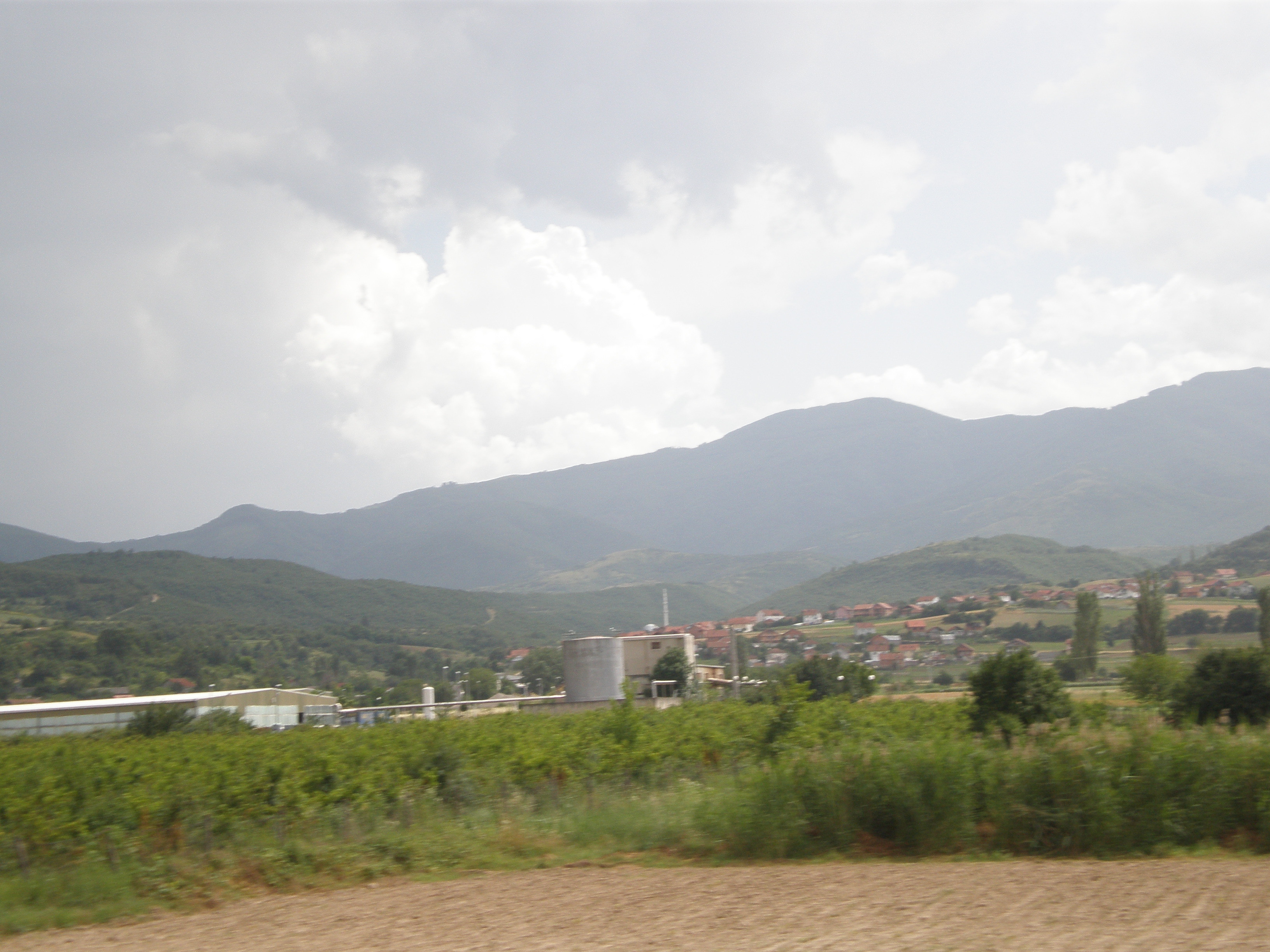 Поглед на селото Морани и фабриката „Фруктал“ од пругата Скопје - Велес